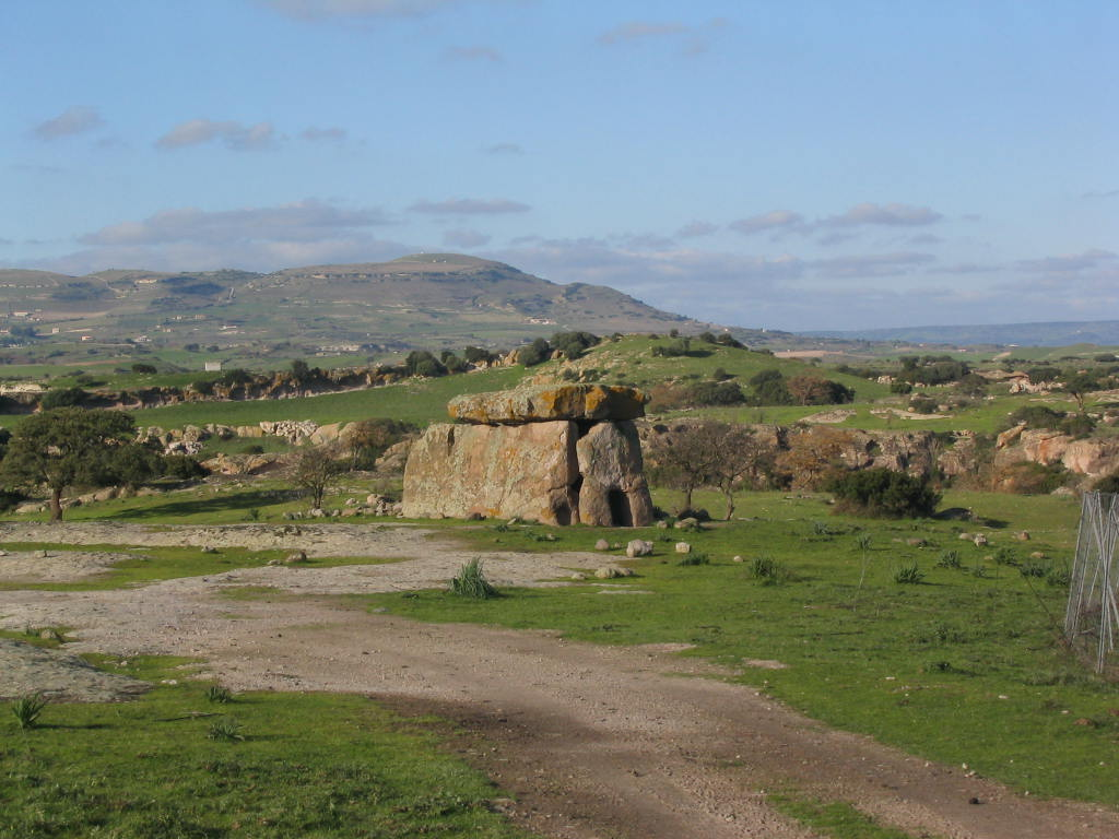 Mores, Sardegna, Italia